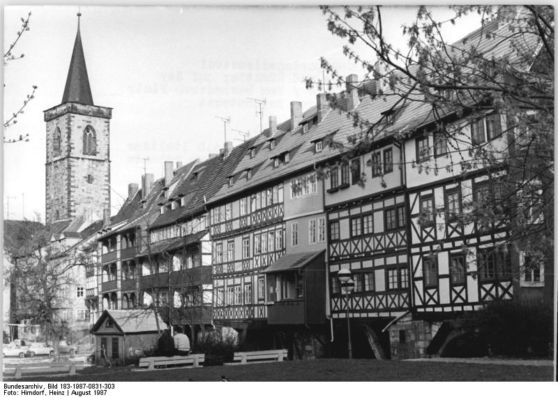 ADN-ZB-Hirndorf-31.8.1987- : Handwerker und Künstler auf der Krämerbrücke- Vom besonderen Flair einer Erfurter Berühmtheit. Die Erfurter Krämerbrücke ist außerhalb Italiens die einzige erhaltene, dicht mit Häusern bebaute Straßenbrücke. Zweiundsechzig Gebäude trug der 1325 in Stein gebaute Übergang über die Gera ursprünglich, heute sind es nach Zusammenlegung noch 32. Kleine Läden verleihen dem einzigartigen Denkmal der Verkehrs- und der Baugeschichte bis heute seinen Reuz. Vor allem Handwerker und bildende Künstler haben in jüngster Zeit in den zum Teil bereits rekonstruierten Häusern Heimstatt genommen.